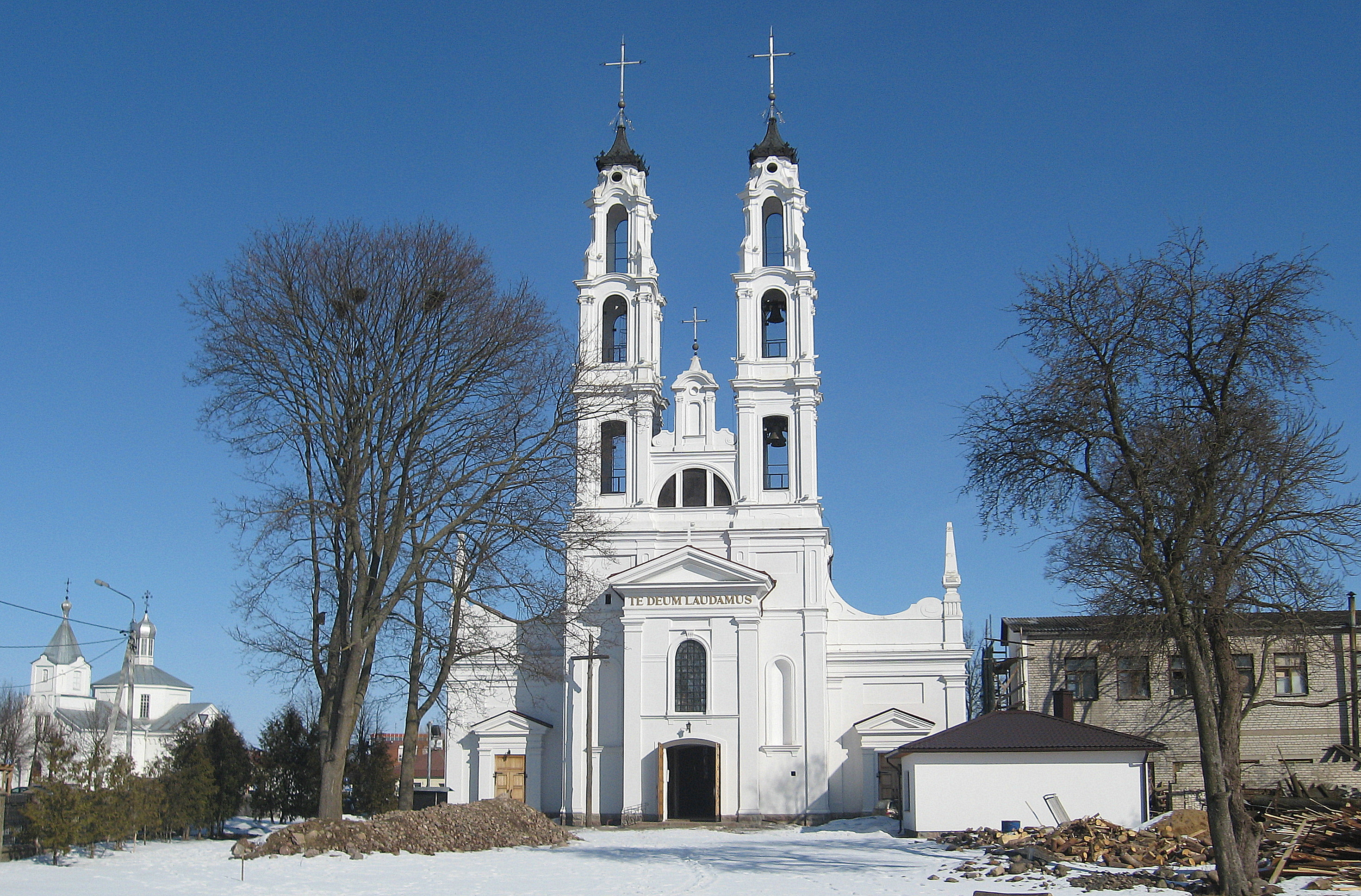 Фасад католического костёла в городе Ошмяны